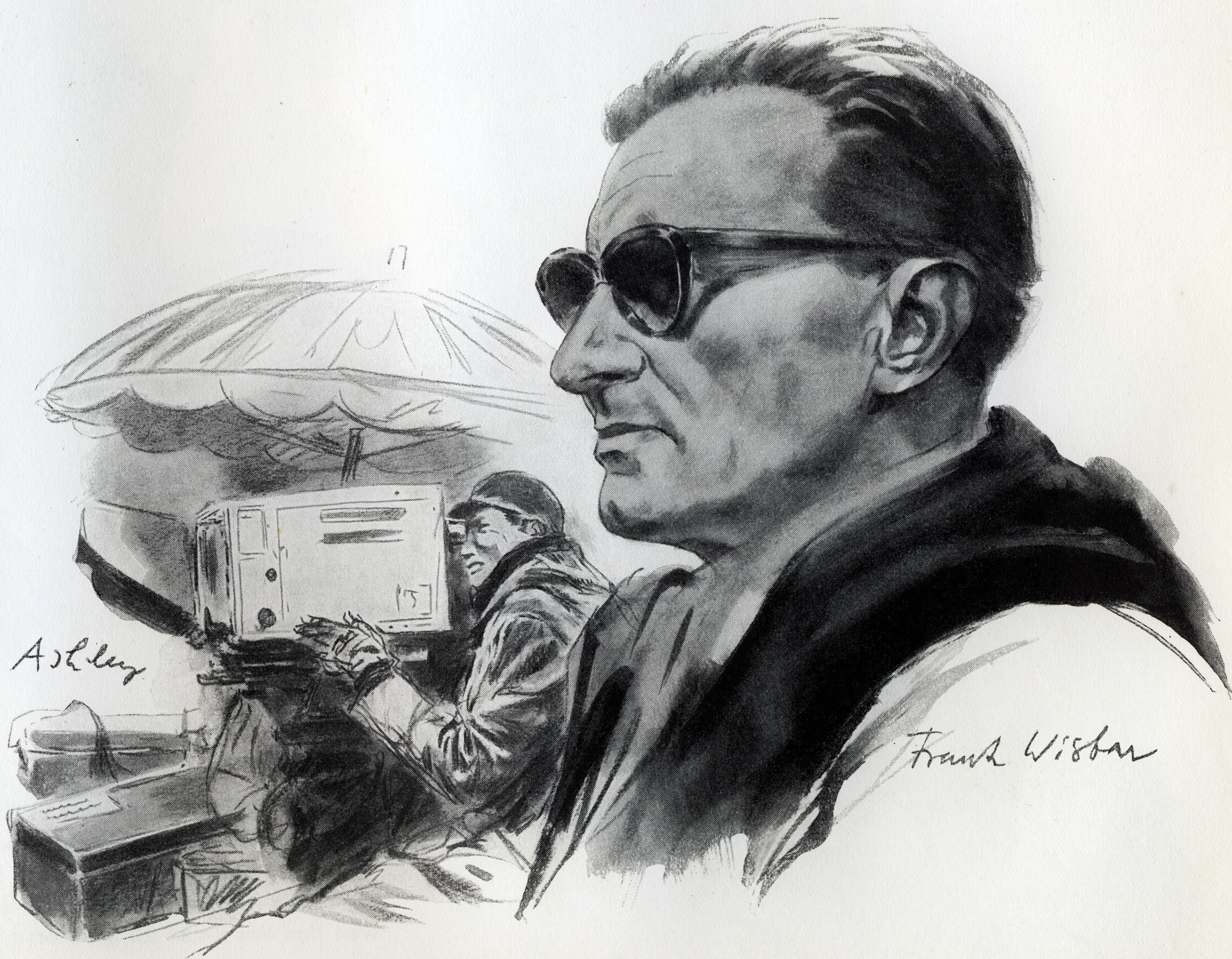 Regiseur Frank Wisbar, Bleistiftzeichnung vom Helmuth Ellgaard